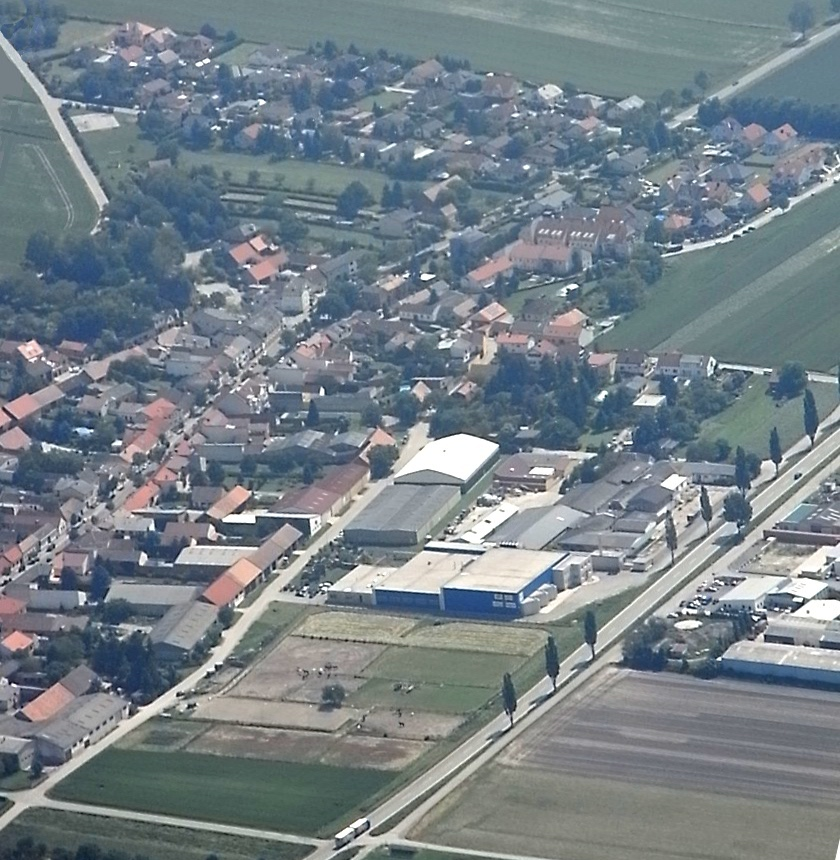 Gallbrunn (Trautmannsdorf, Aŭstrio).